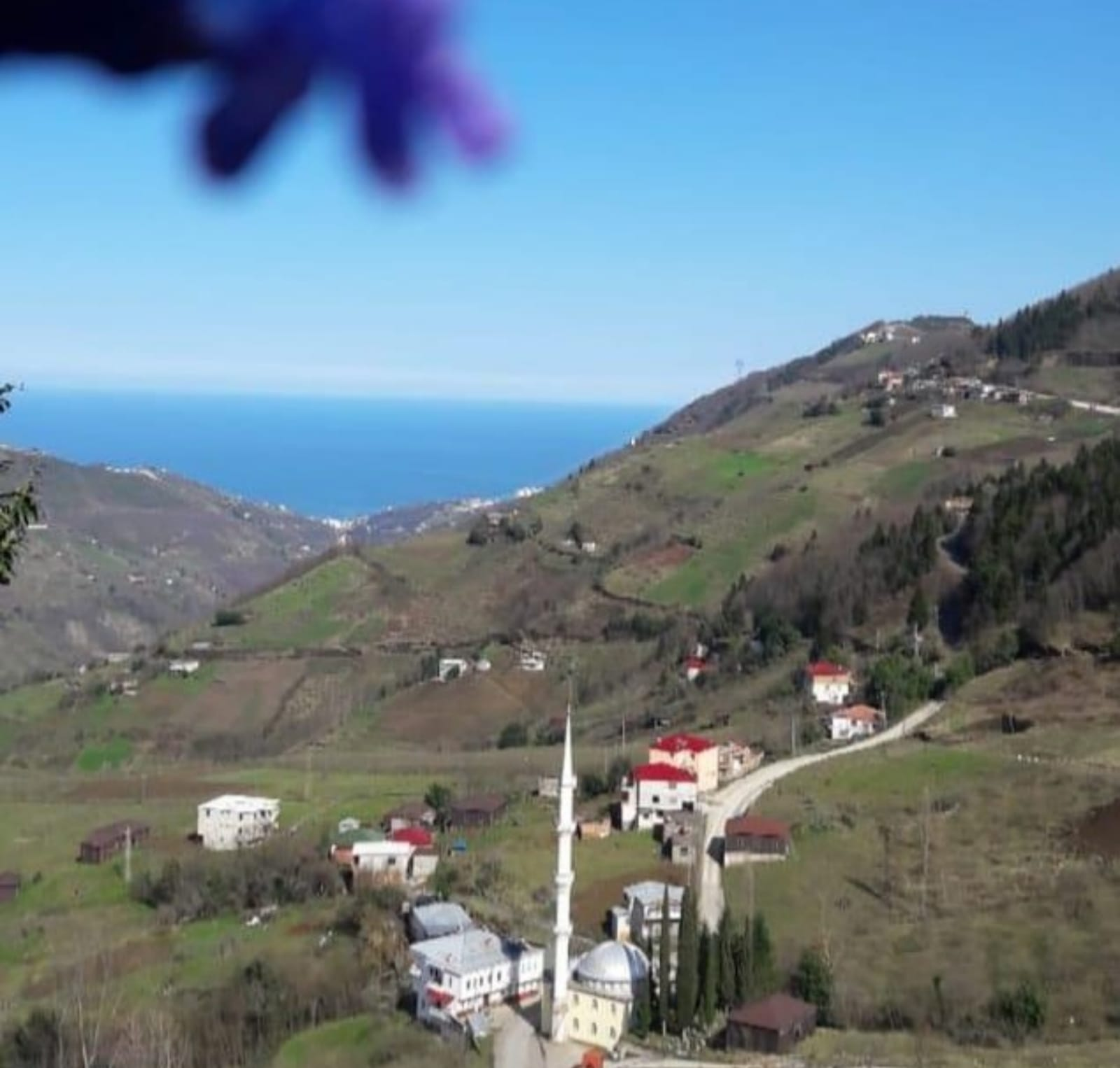 Ortaköy (Satari) den Tepeleri Denize Bakan Bir Manzara